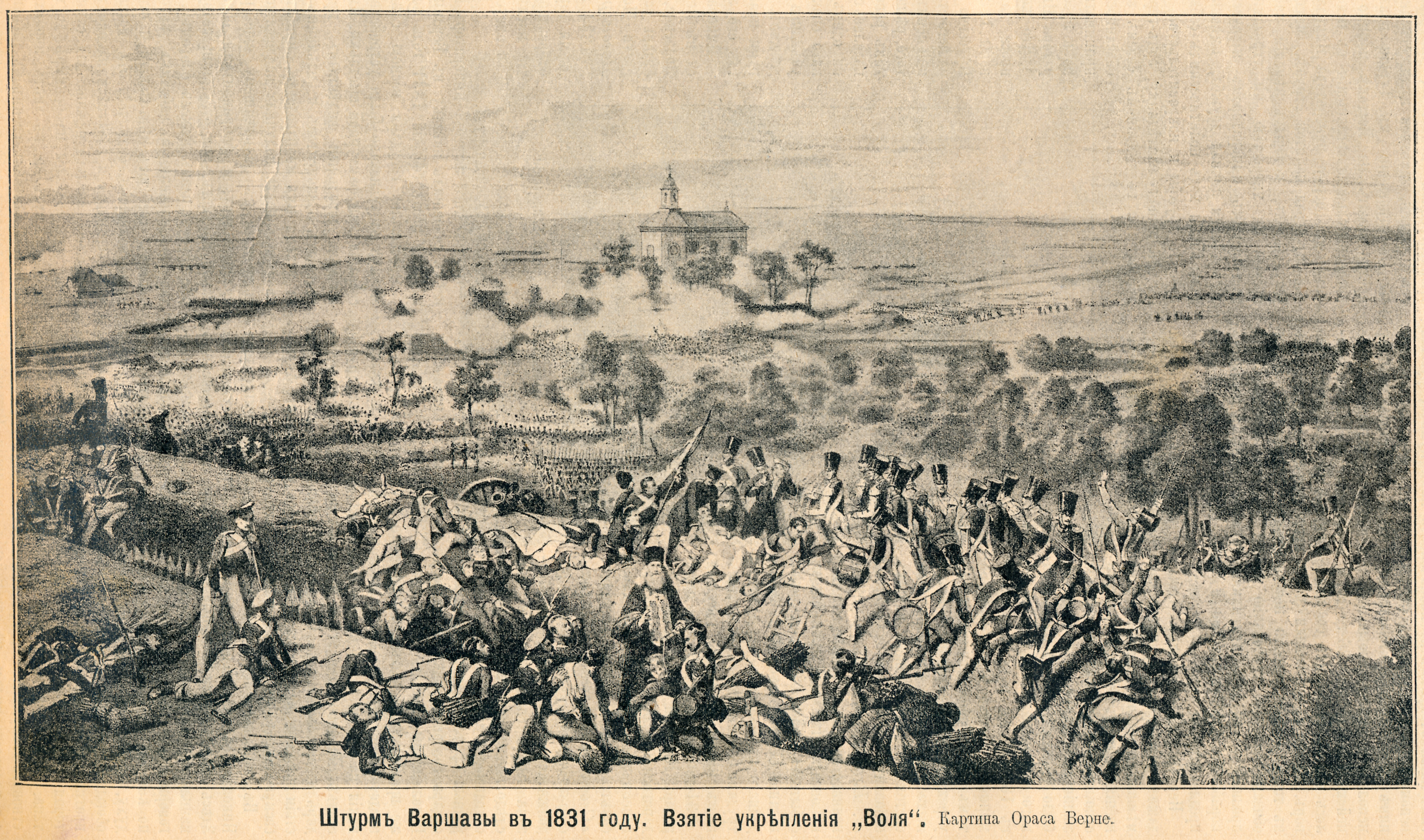 Штурм Варшавы, взятие укрепления Воля в 1831 году. Картина Ораса Верне.